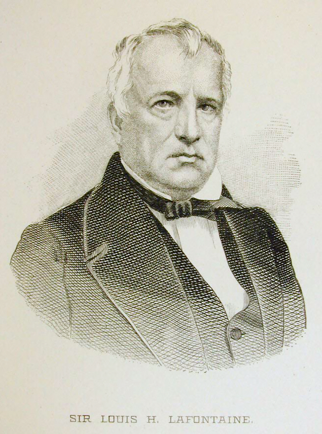 Sir Louis-Hippolyte Lafontaine (1807-1864), gravure. Publiée dans le volume 8 de Histoire des Canadiens-français, 1608-1880 : origine, histoire, religion, guerres, découvertes, colonisation, coutumes, vie domestique, sociale et politique, développement, avenir / par Benjamin Sulte ; ouvrage orné de portraits et de plans. Montréal : Wilson & cie, éditeurs, 1882-1884, 8 vol.